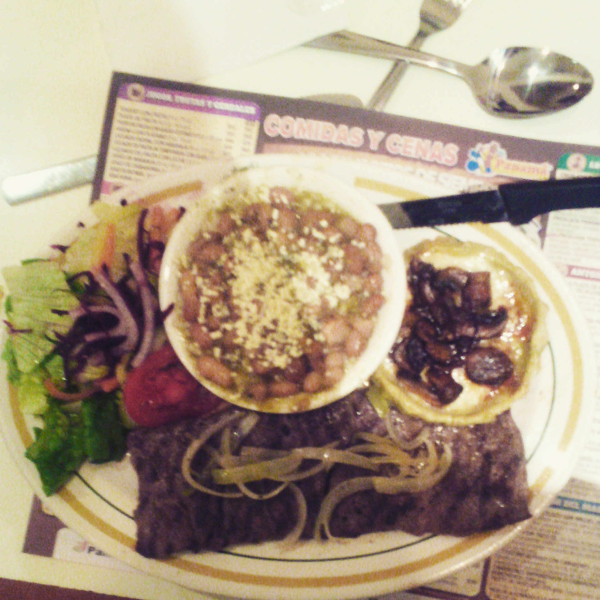 Platillo en un restaurante popular de Mazatlán.